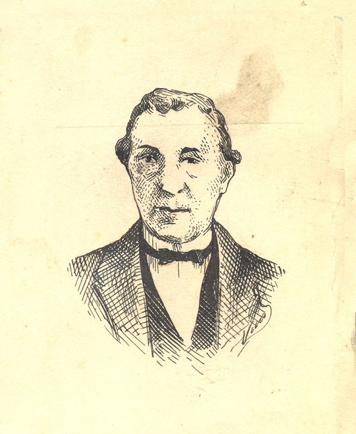 Arteta.